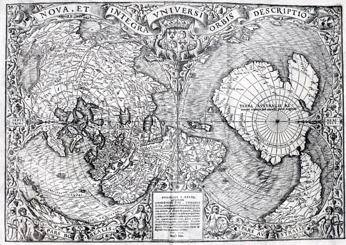 Oronce Fine (1494-1555) Doppelherzförmige Weltkarte zuerst 1531) Auf dieser Karte ist erstmals das westliche Meer als Mare Magellanicum bezeichnet und die Magellanstraße beschriftet.